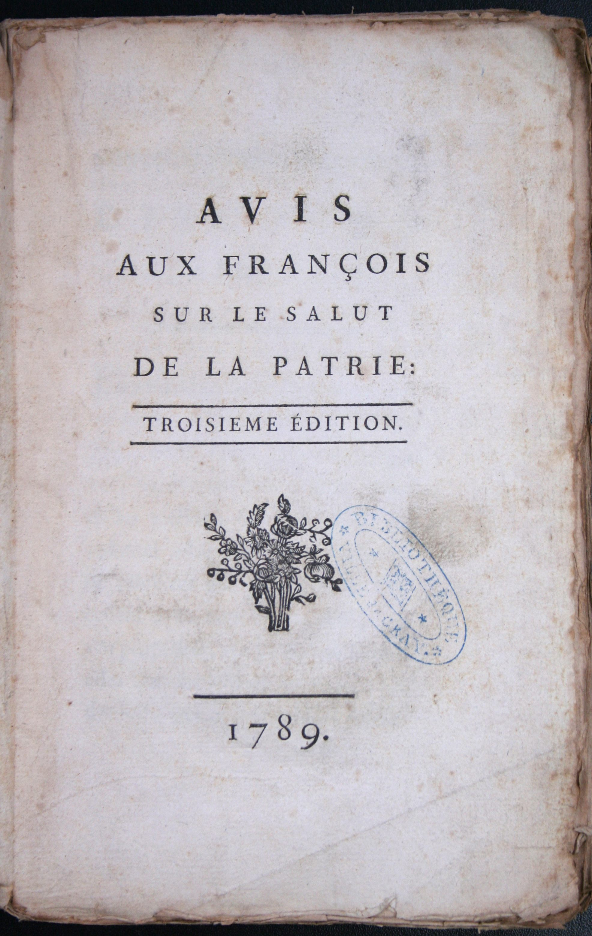 Avis aux François sur le salut de la Patrie (non signé mais attribué à Jérôme Pétion de Villeneuve) (exemplaire de la bibliothèque patrimoniale de Gray (France).